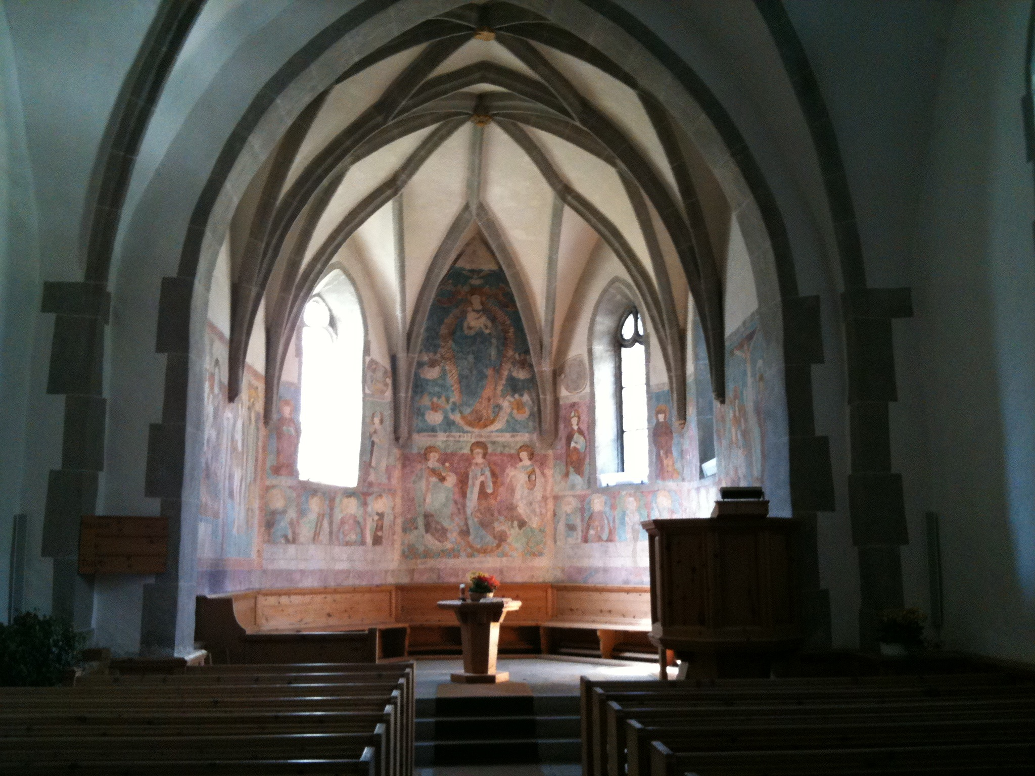 reformierte Kirche San Bastian in Zernez, Kanton Graubünden